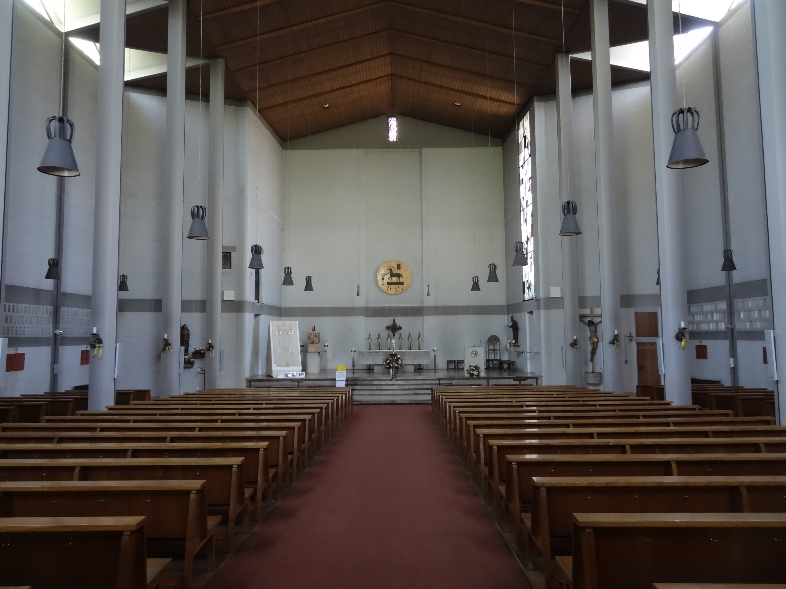 Innenraum der Pfarrkirche St. Pius in Landshut